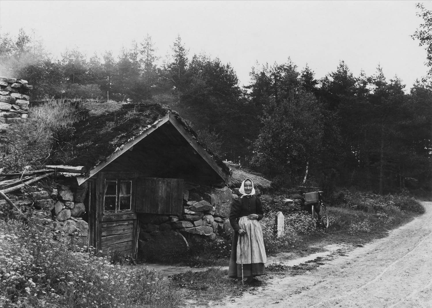 Depicted place: Småland, Östbo hd, Åker, Klevshult (Sverige (SE))